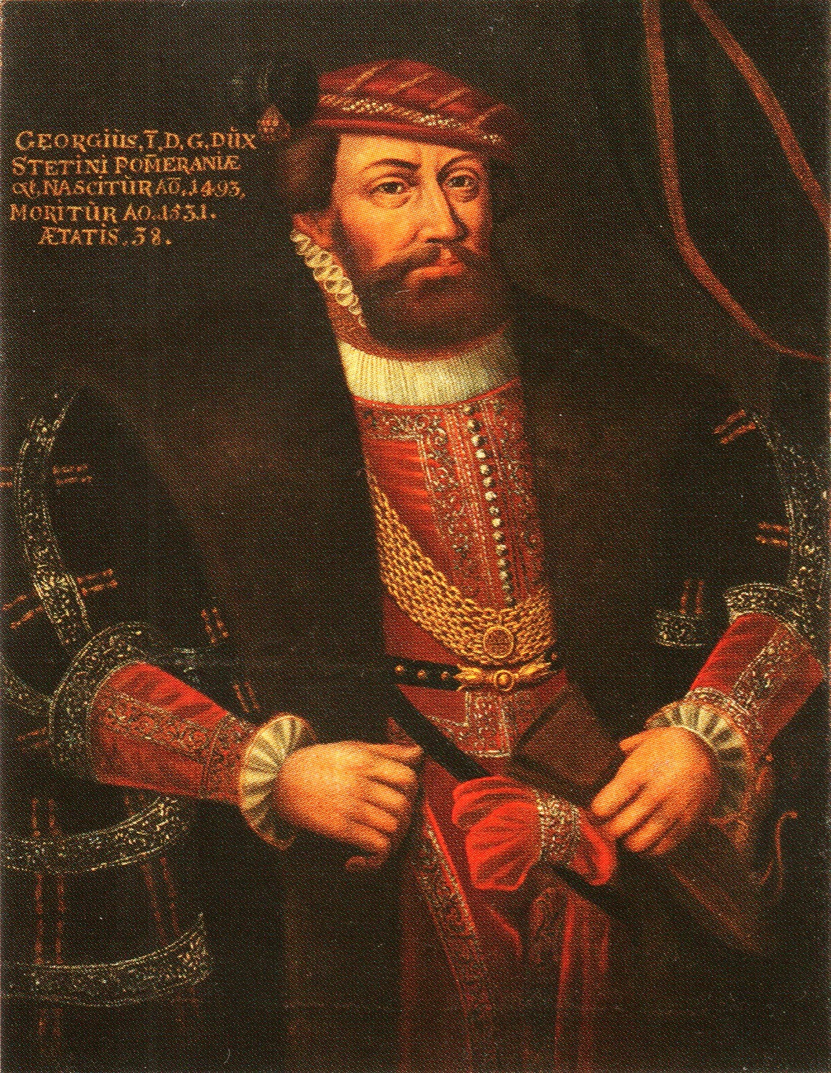 Ölgemälde von Herzog Georg I. von Pommern, Kopie nach einer Vorlage im Alten Rathaus in Anklam